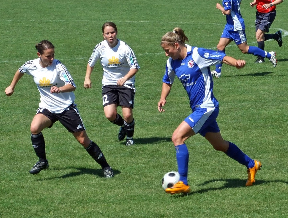 Bianca Schmidt vom 1. FFC Turbine Potsdam, 2008